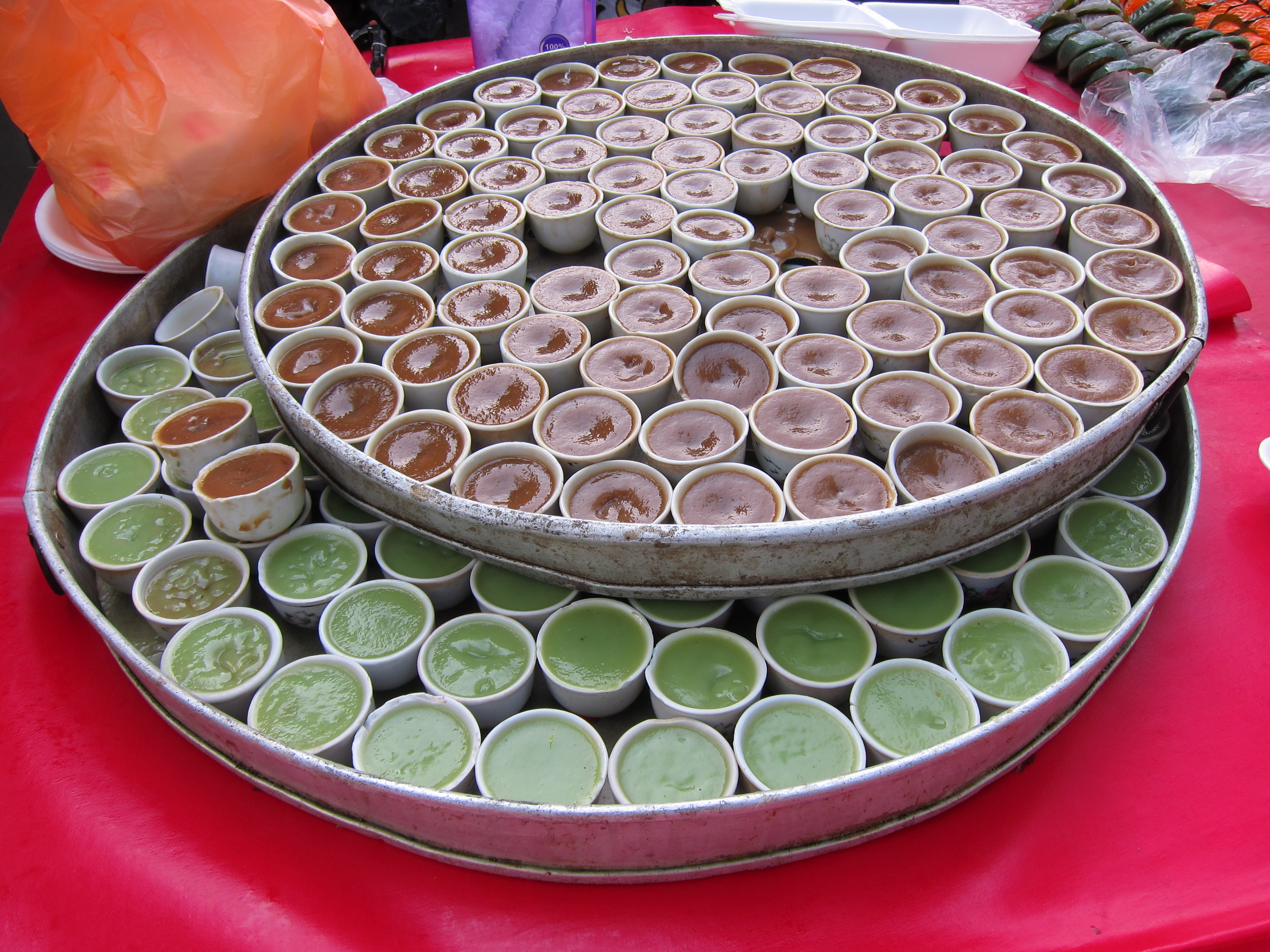 Kuih Kosui in Imbi Pasar